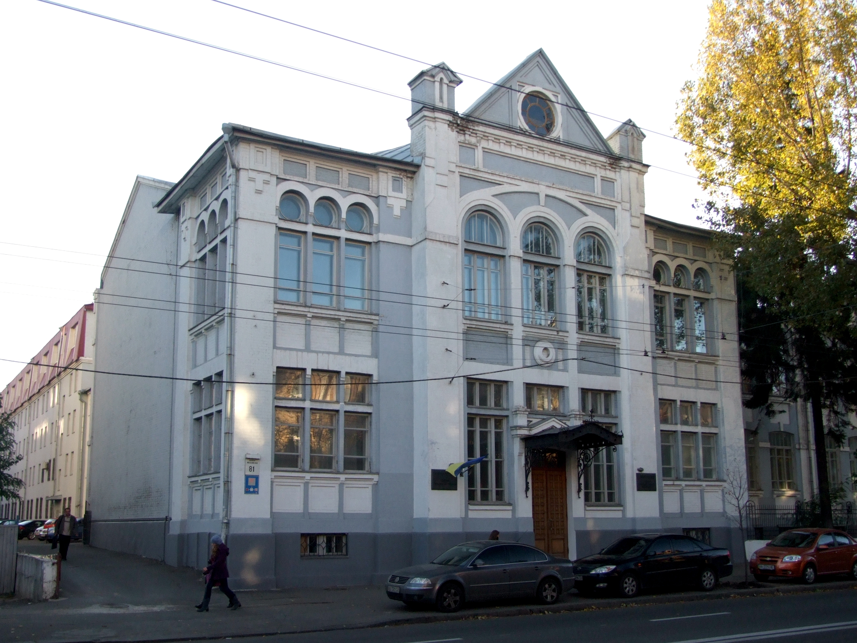 6-а чоловіча гімназія, арх. О. Кобелєв, П. Жуков, 1912–1913 рр.